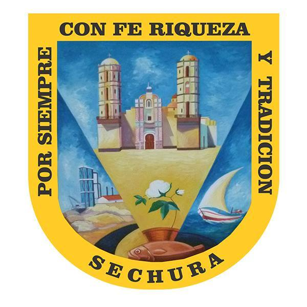 Escudo Sechura